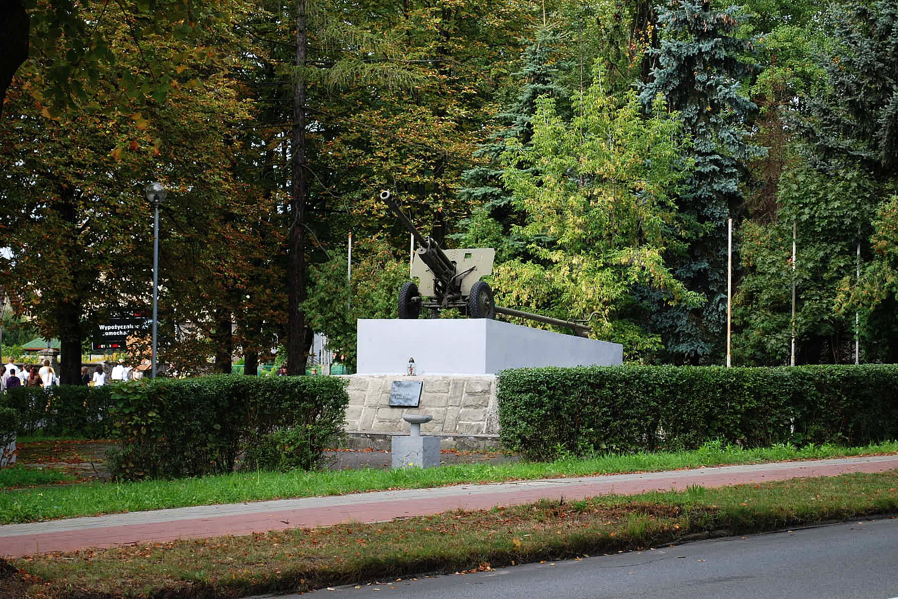 Armata ZiS-3 jako pomnik w Tarnowskich Górach.